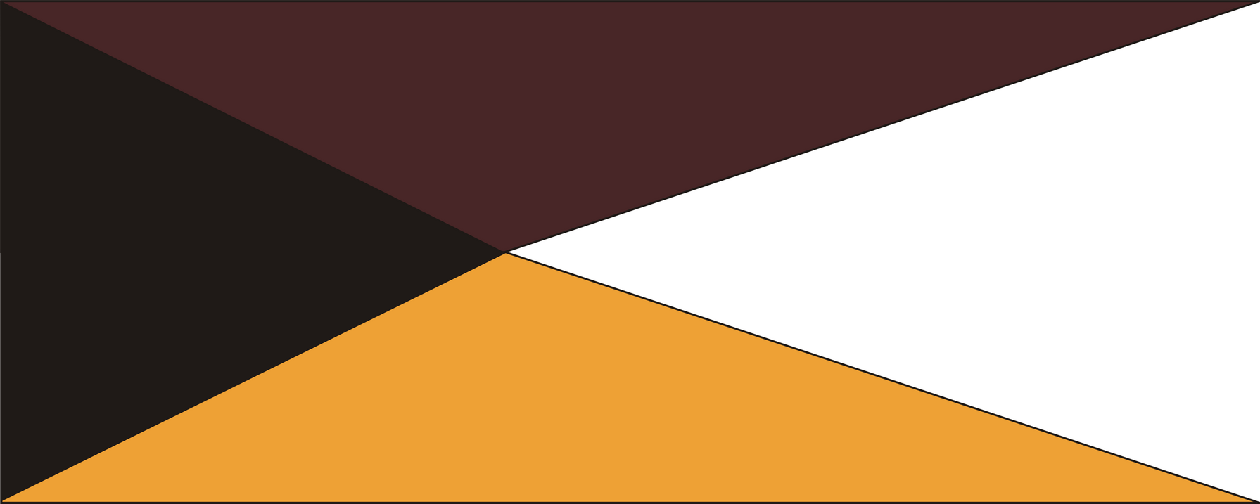 Proporczyk 1 Pułku Artylerii Przeciwpancernej Polskich Sił Zbrojnych na Zachodzie